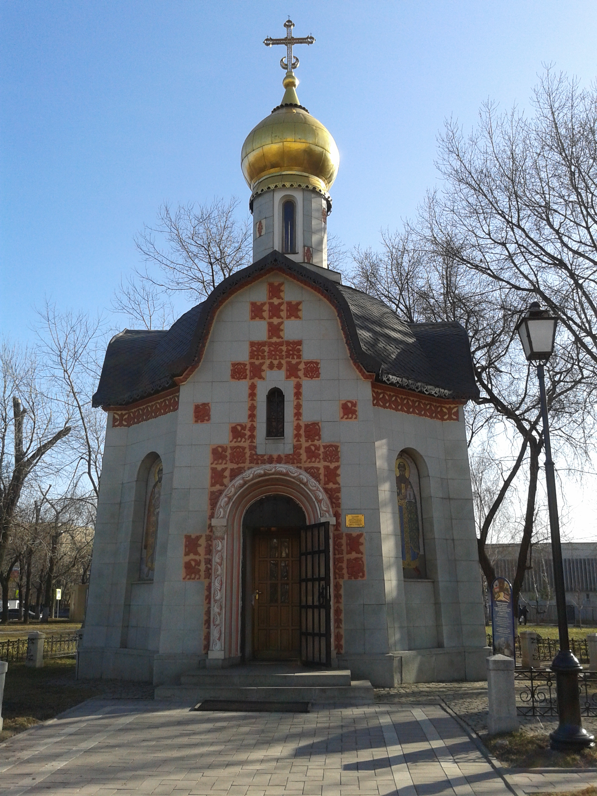 Часовня св. Даниила Московского. Москва, станция метро "Тульская" (рядом с Даниловым монастырём)